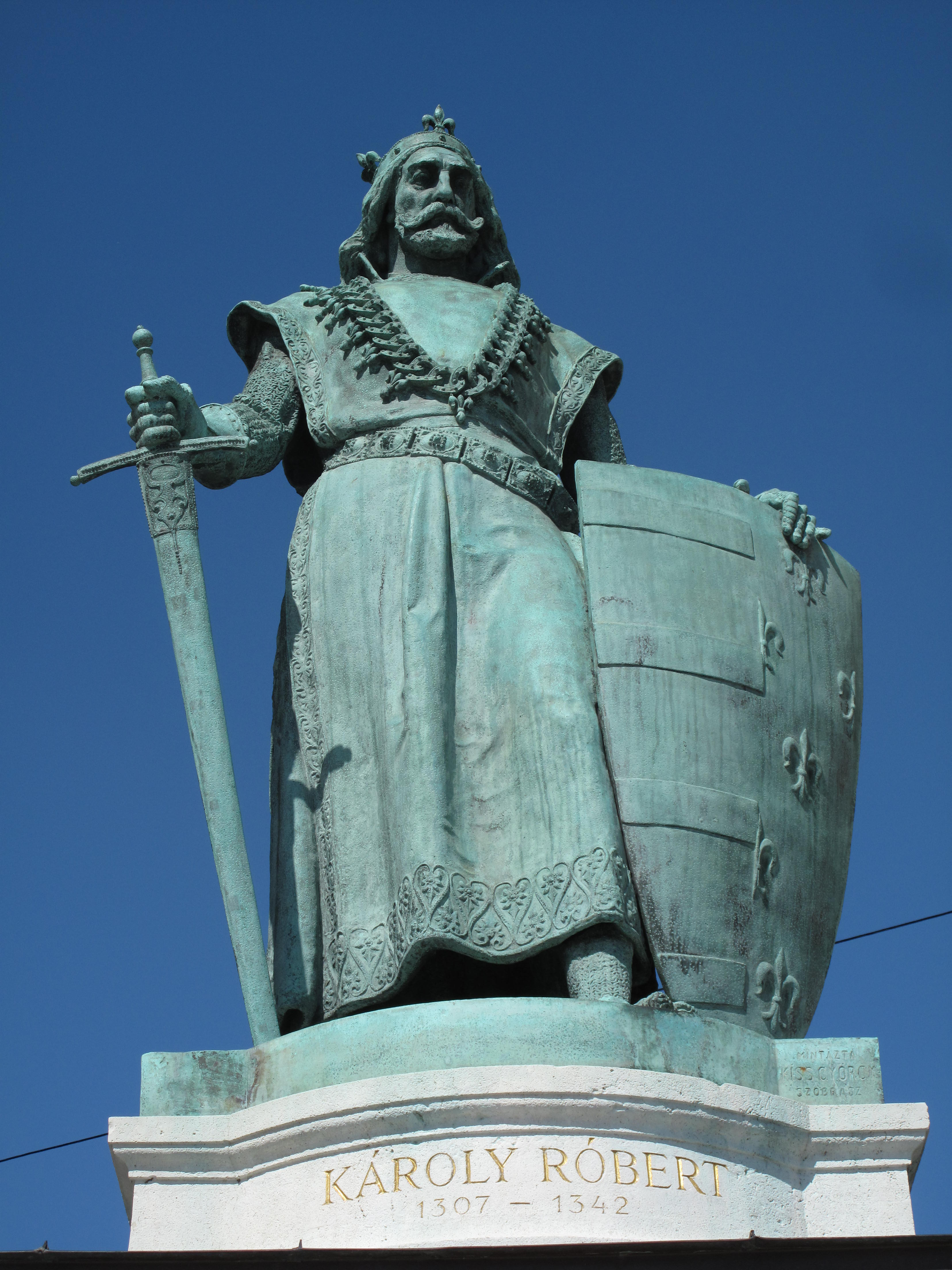 Náměstí Hrdinů, Budapešť